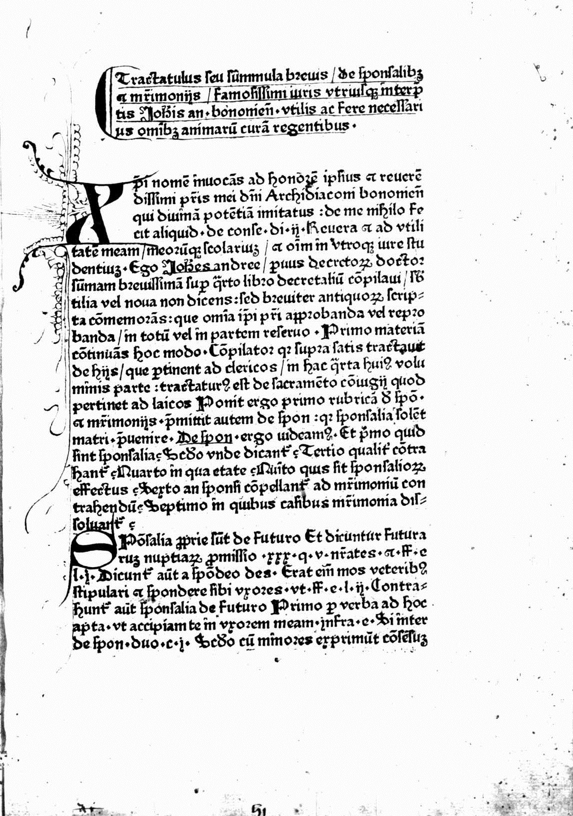 carta pi greco 2r